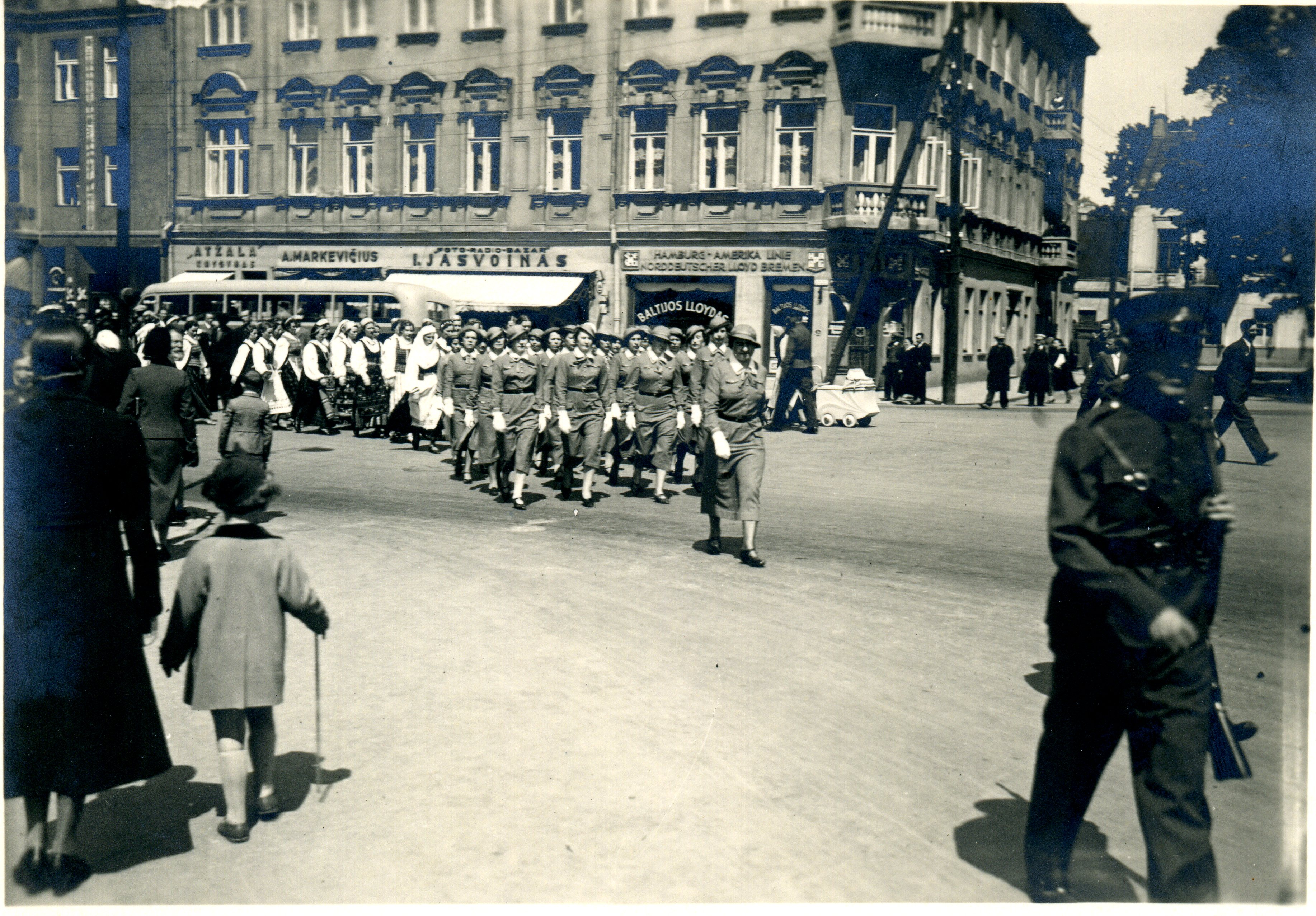 Dainų šventės, vykusios Kaune 1937 m., dalyviai žygiuoja miesto gatvėmis.